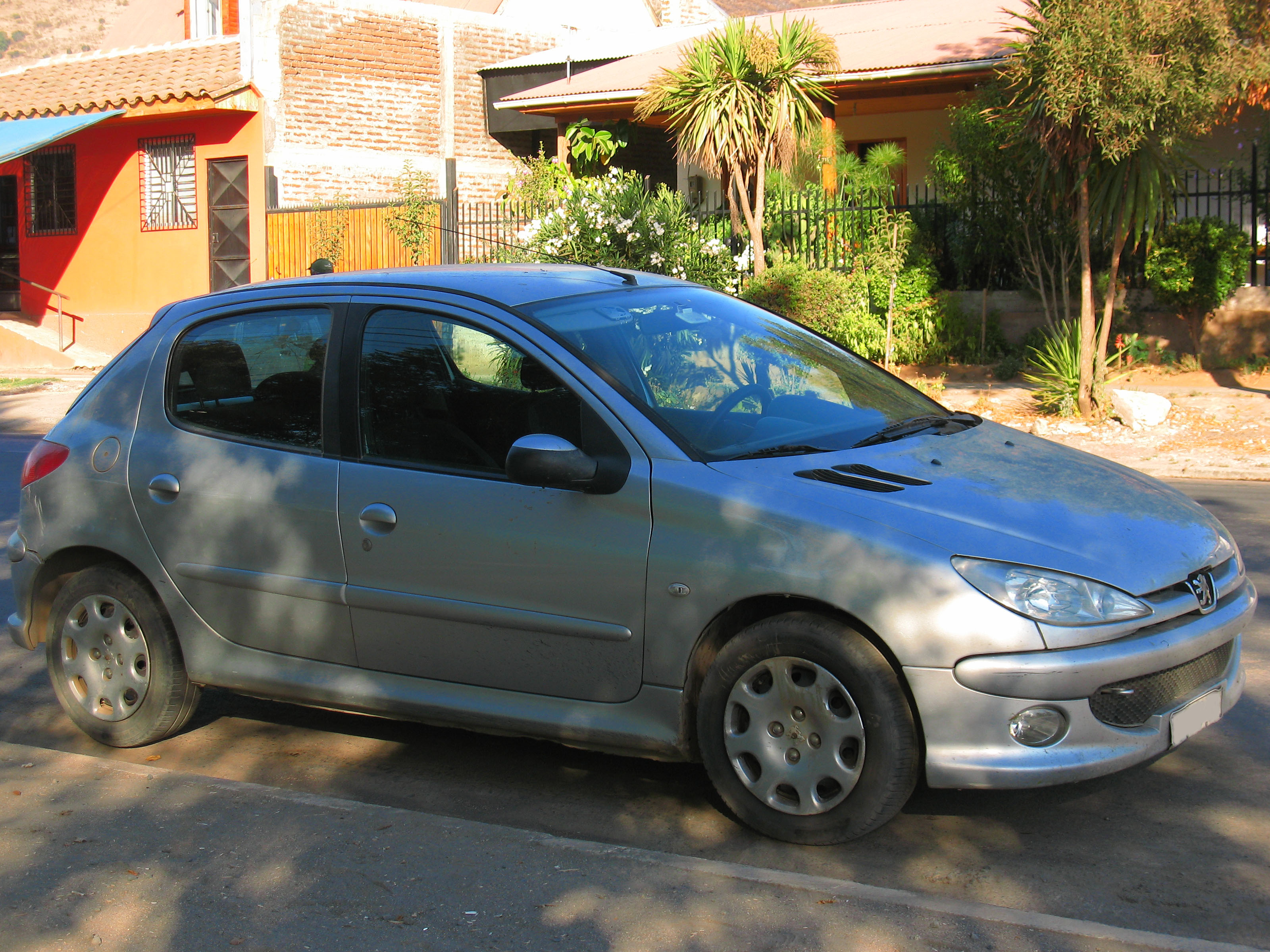 Peugeot 206 1.4 HDi X-Line 2008